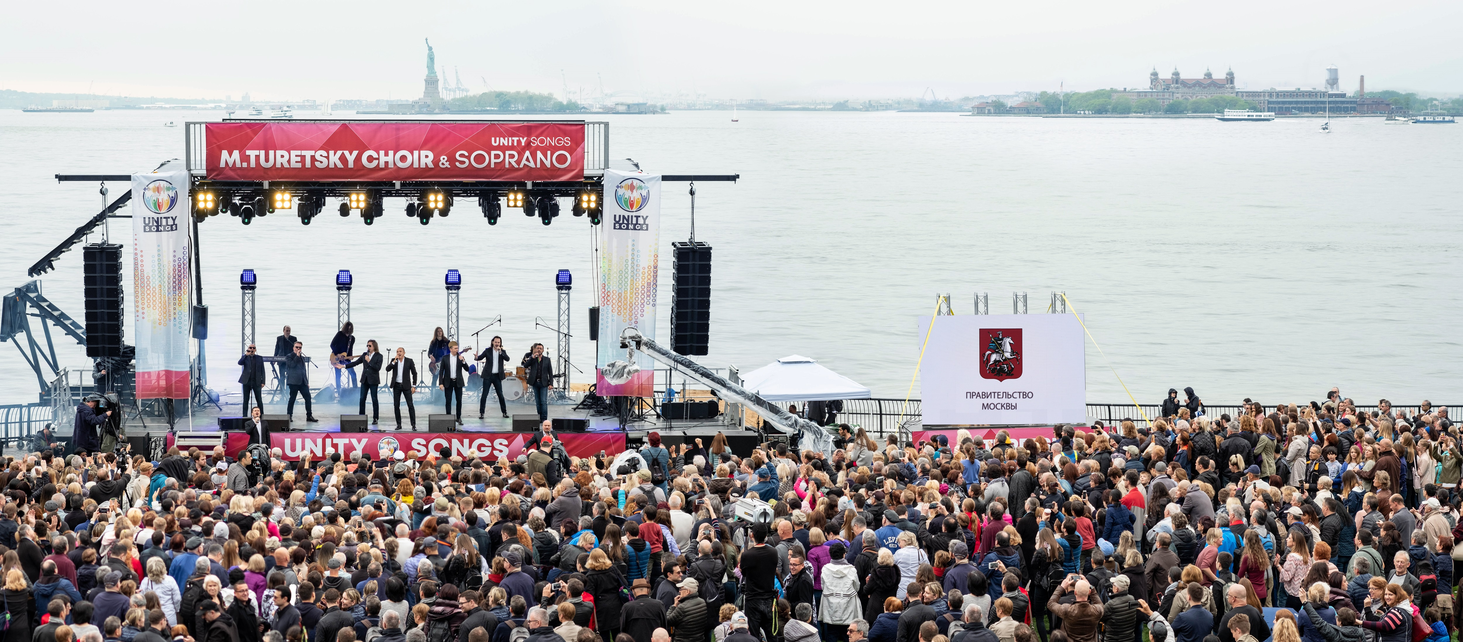 Unity Songs New-York 2018 Turetsky Choir